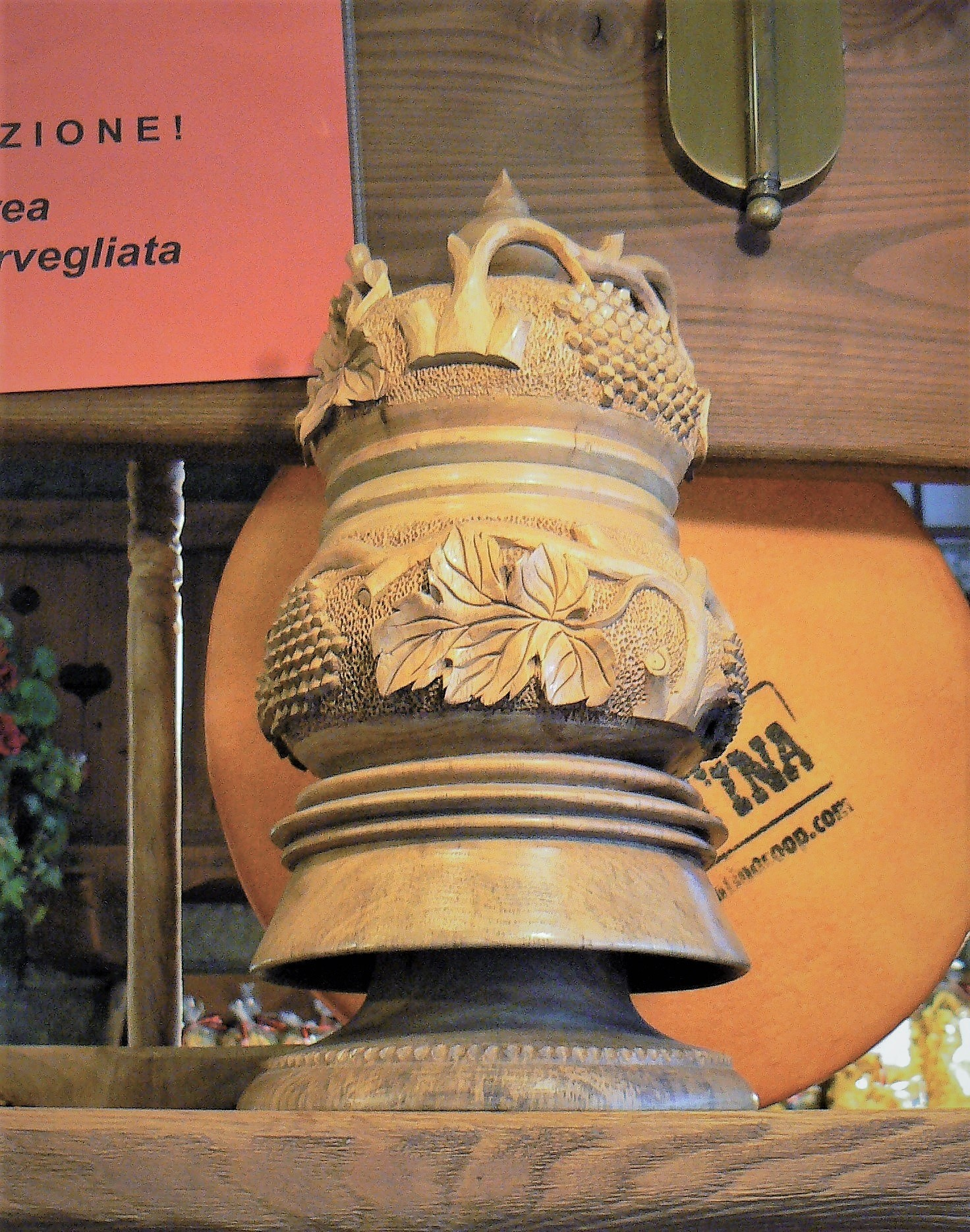 grolla fotografata da Bertolin (Arnad)